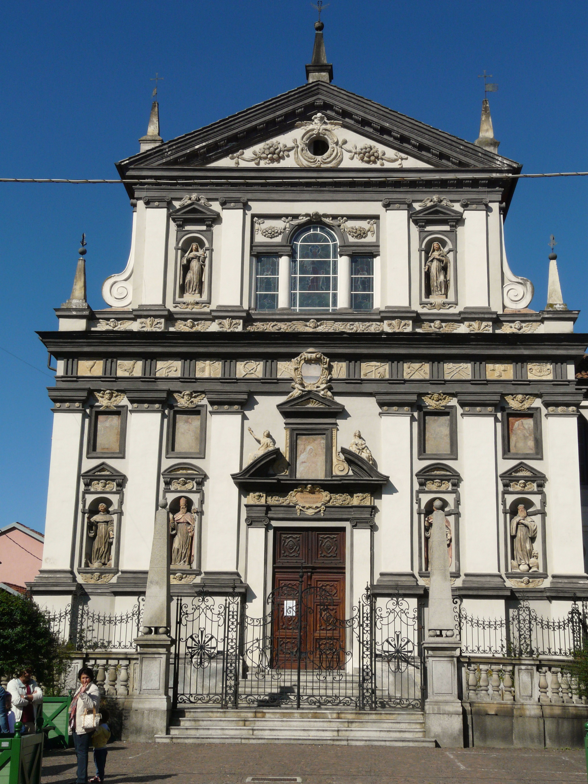 Santuario di Nostra Signora delle Grazie, Carignano, Piemonte, Italia.